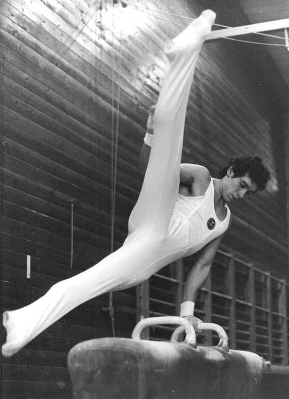 Michael Nikolay ADN-ZB Mittelstädt 6.12.79-str-Fort Worth-USA: 20. Weltmeisterschaften im Turnen - Hervorragend plaziert vor dem Mehrkampffinale ist der Berliner Turner Michael Nikolay. Mit 116,85 Punkten liegt er auf dem siebenten Platz noch vor Olympiasieger und Weltmeister Nikolai Andrianow (UdSSR). Am Seitpferd (Foto) erzielte er 9,85 Punkte. Die DDR-Männer wurden im Mannschaftskampf knapp um 0,15 Punkte von den USA auf Platz vier verwiesen. (Foto von einem früheren Wettkampf)